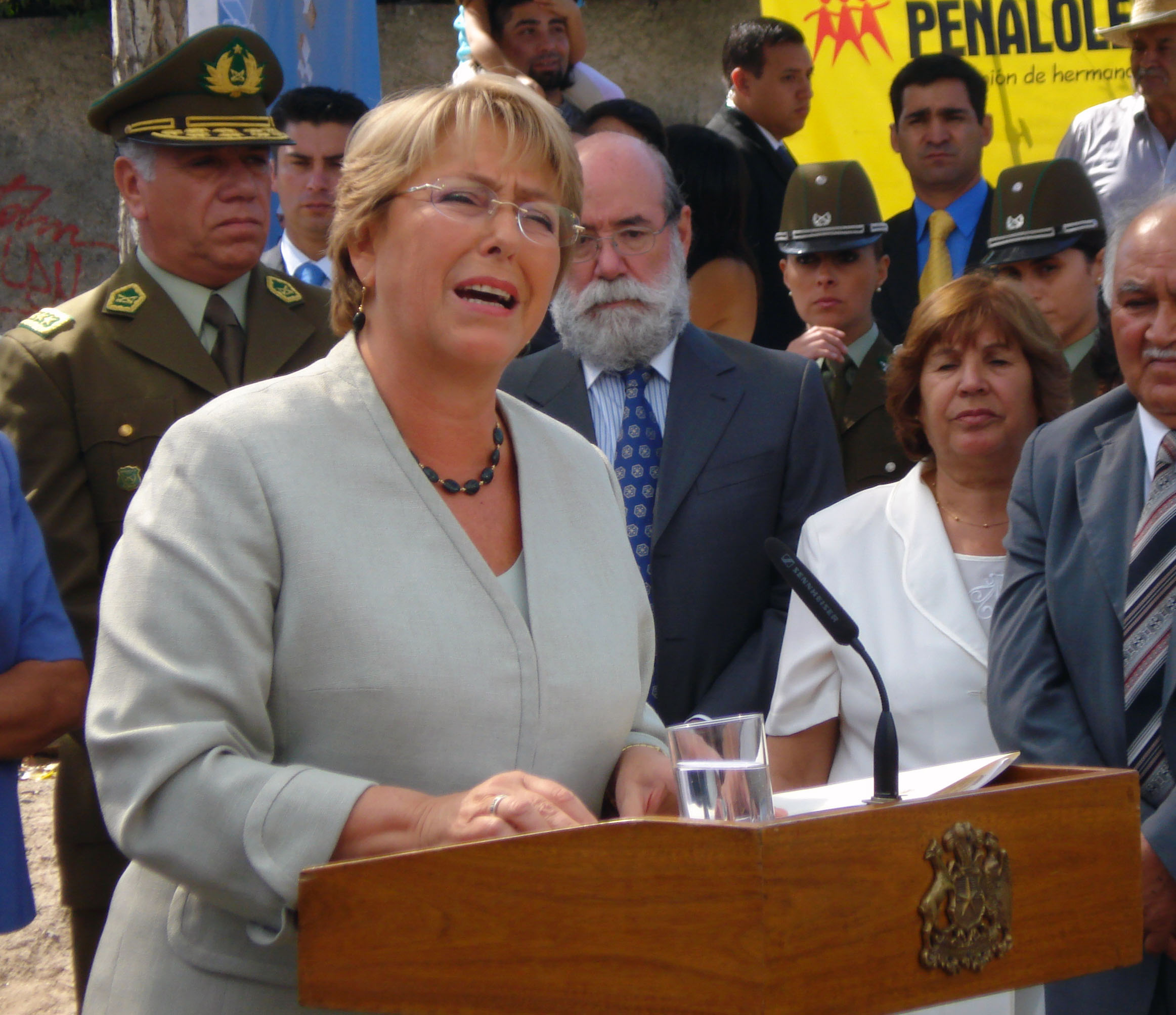 Presidenta de Chile Michelle Bachelet, en visita a la Villa Letelier en Peñalolen.